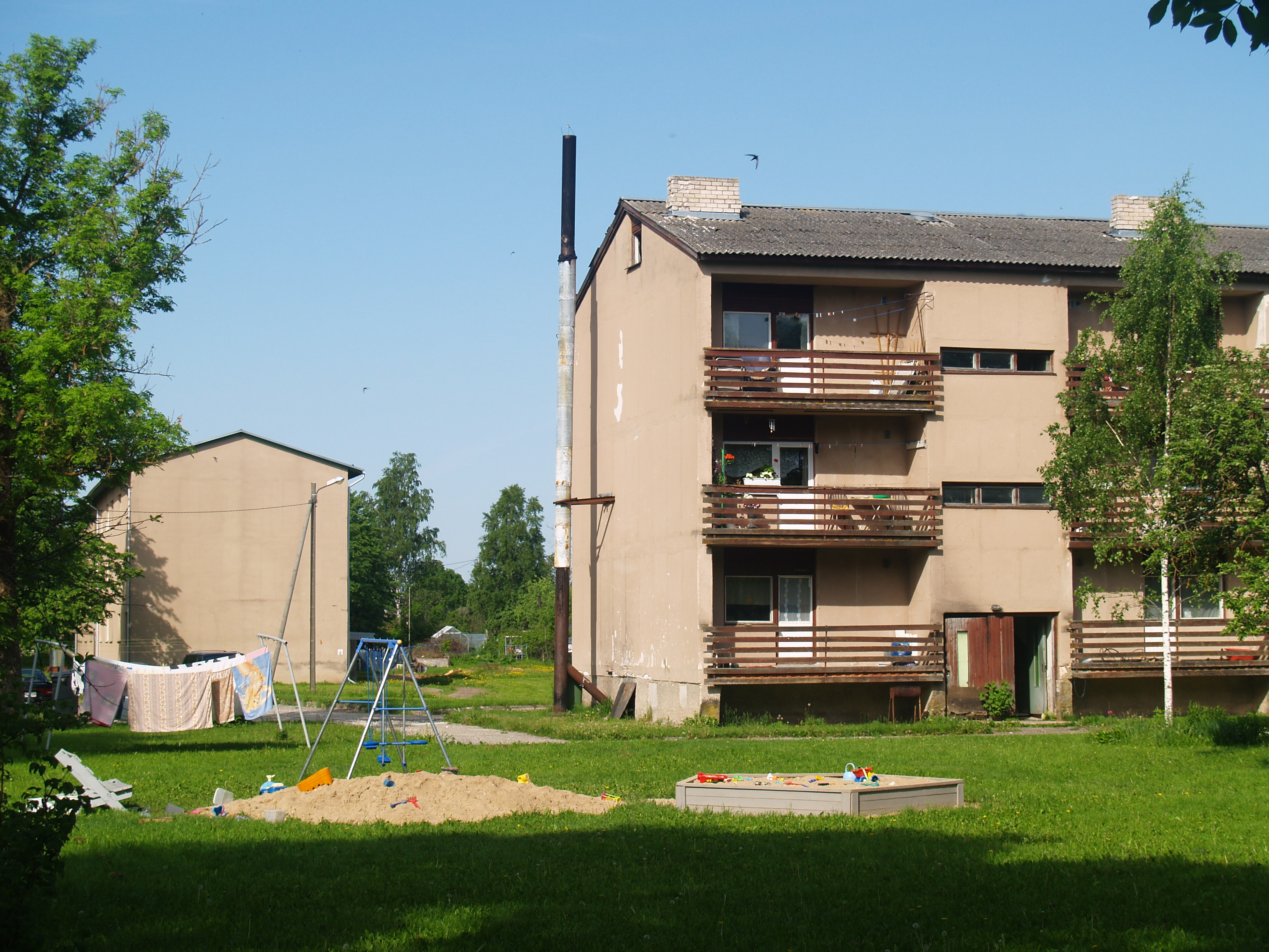 Jõgevamaa fotod